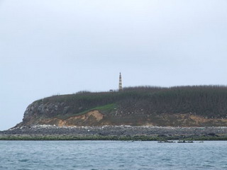 從海面側拍的西崁山